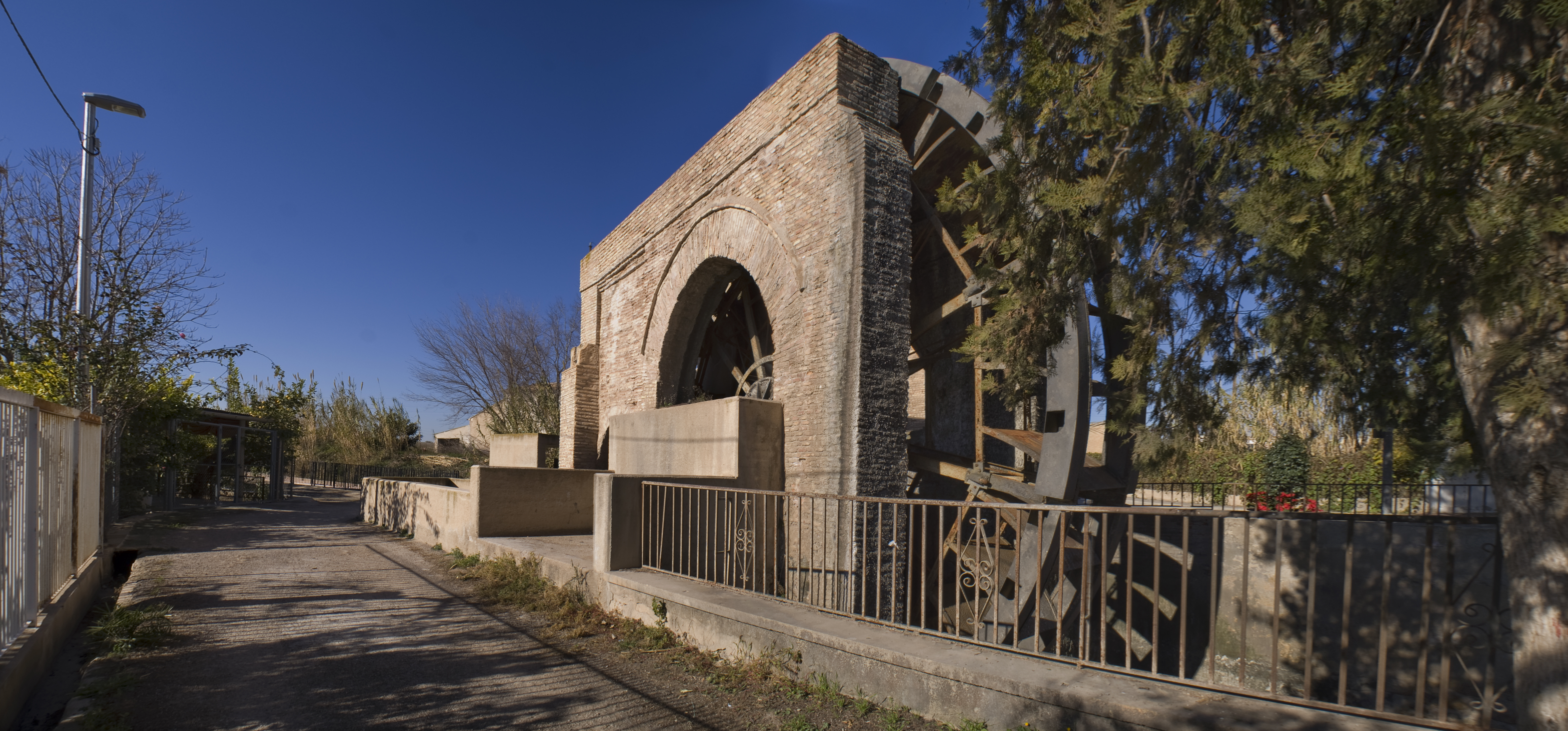 Rueda de la Huerta situada en La Ñora, pedanía de Murcia. Su propósito era la de elevar el agua con el propio movimiento del agua.